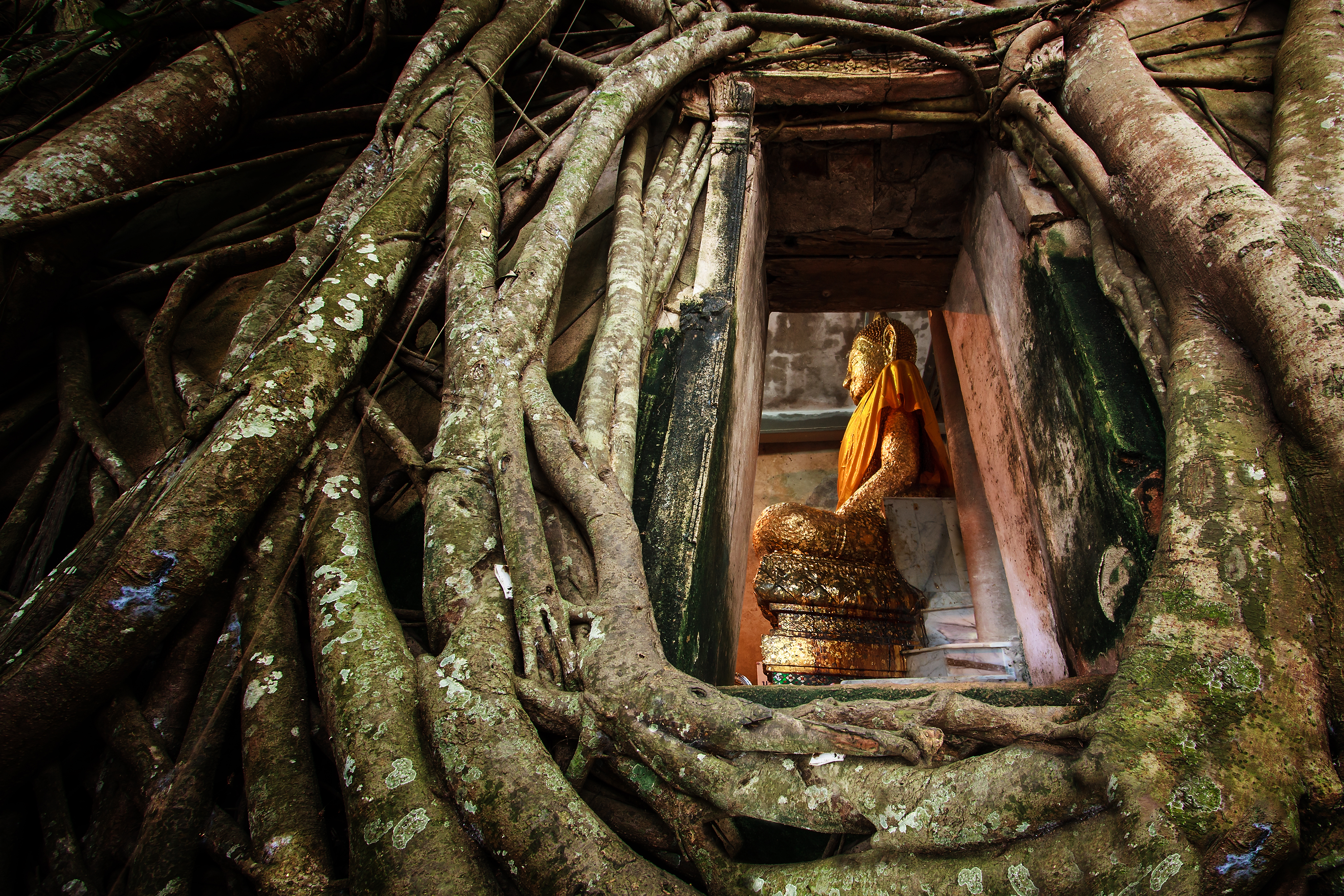 วัดบางกุ้ง